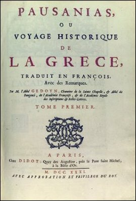 Pausanias: ou Voyage historique de la Grece / traduit en françois, avec des remarques par M. l'abbé Gedoyn... (Paris : chez Didot, 1731) [Overstone Library]